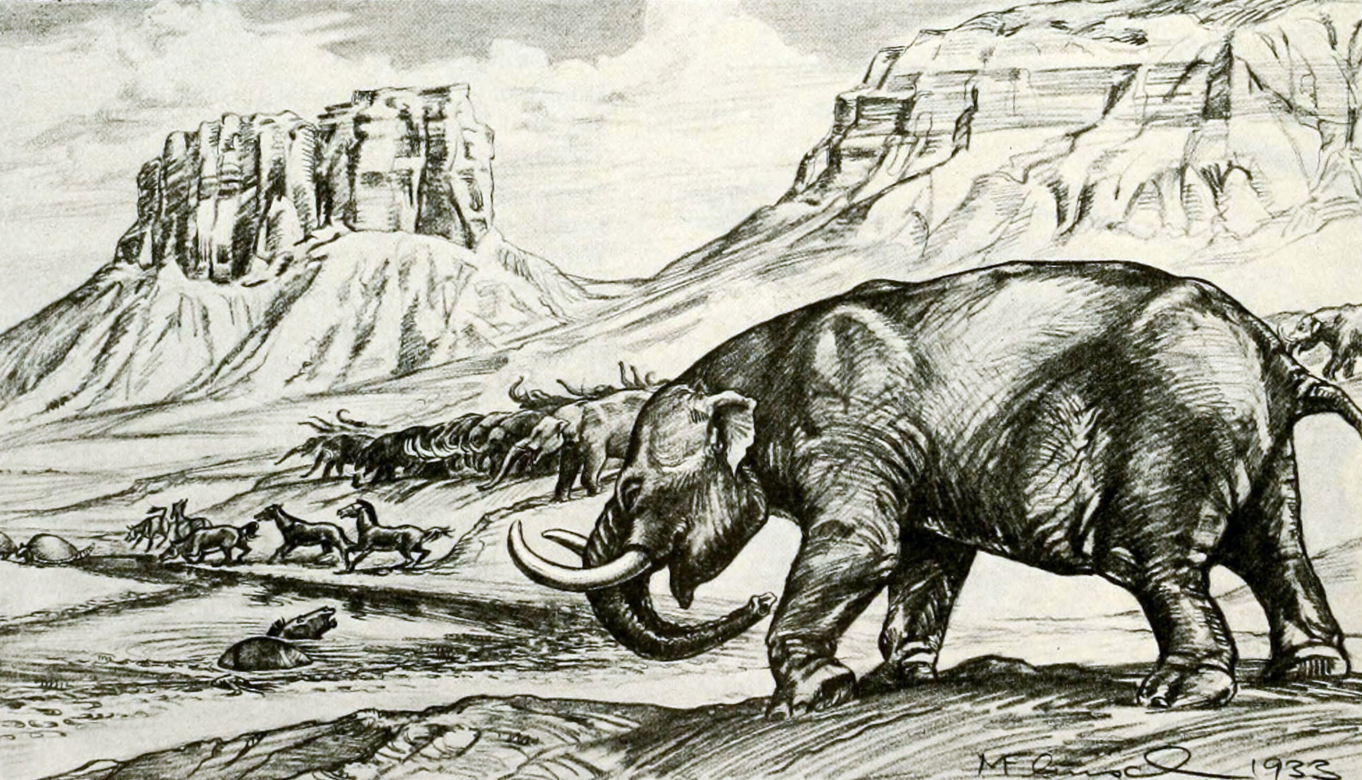 Stegomastodon mirificus (arizonae).